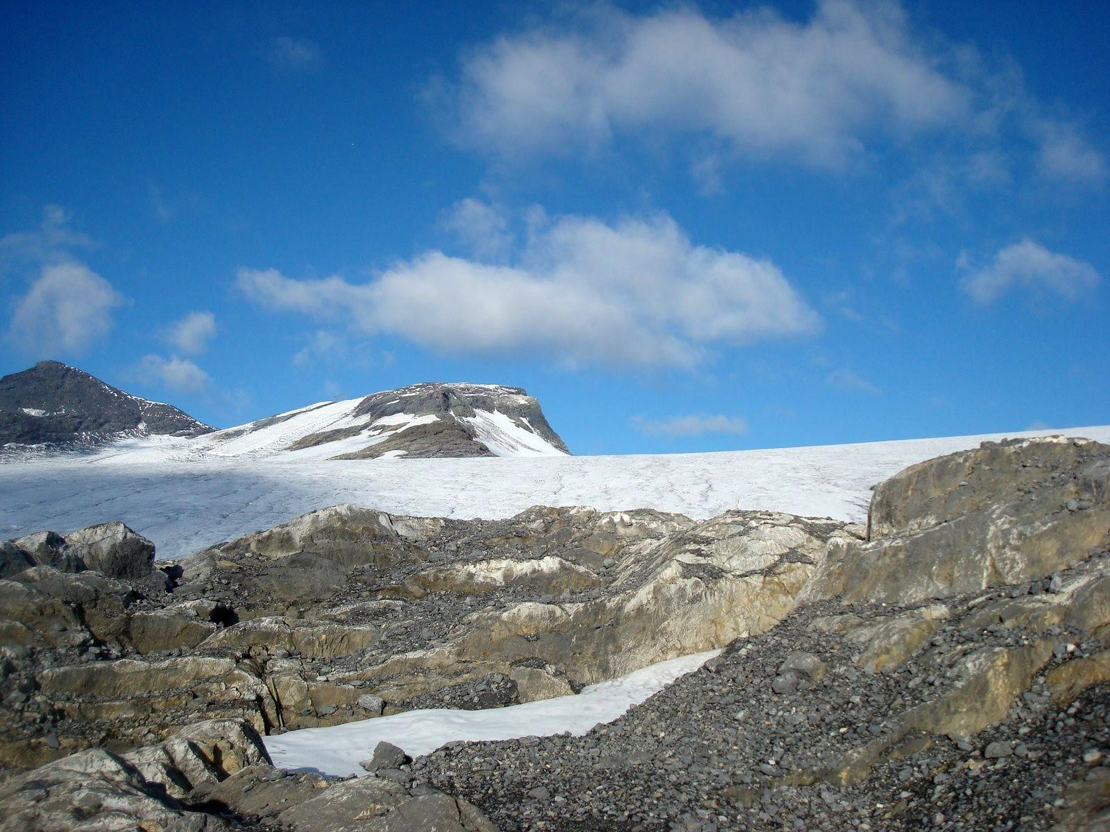 Vorab glacier above Flims